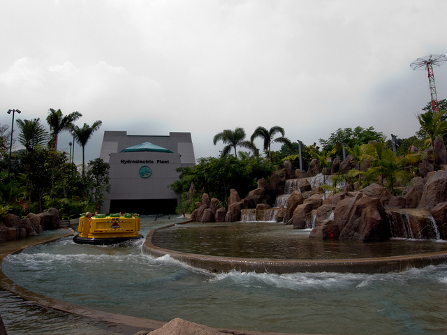 R0012077